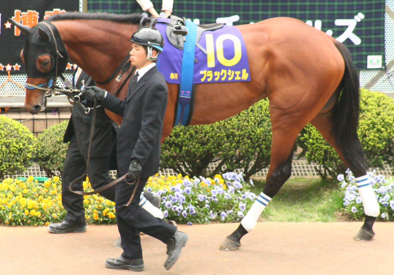 ブラックシェル（中山競馬場 第68回皐月賞）